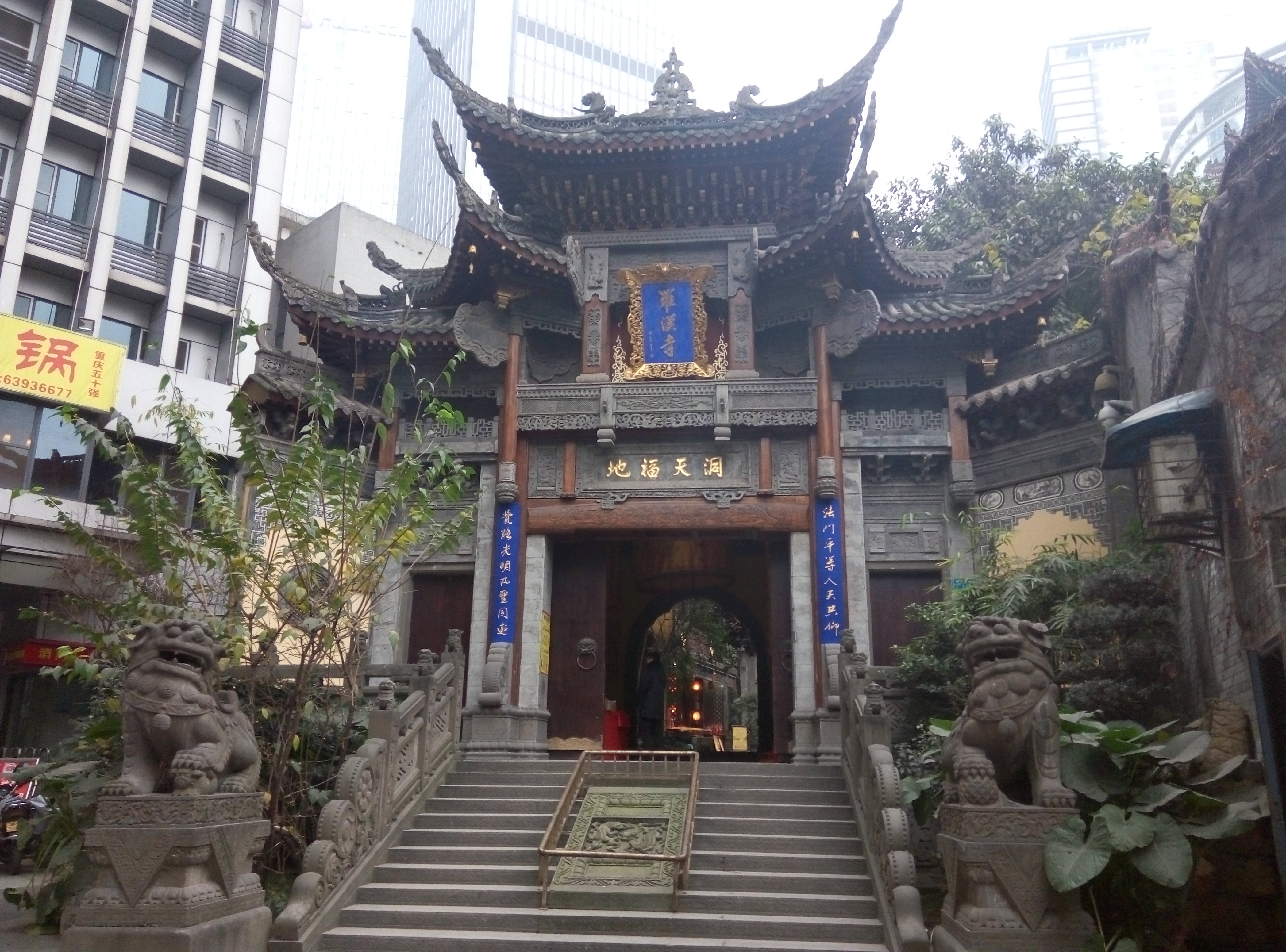 粵語: 重慶渝中羅漢寺